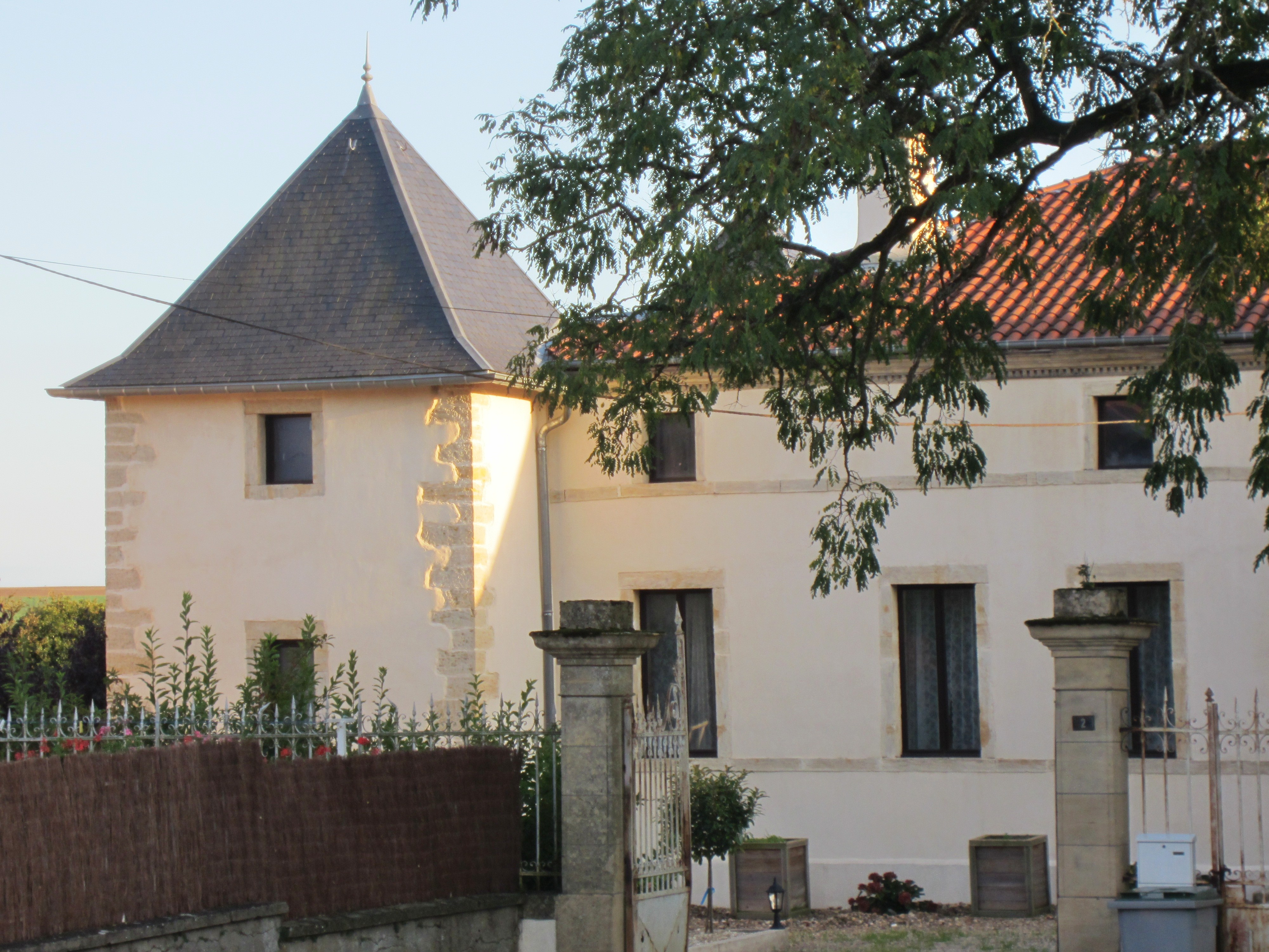 Description chateau Joudreville chateau Joudreville